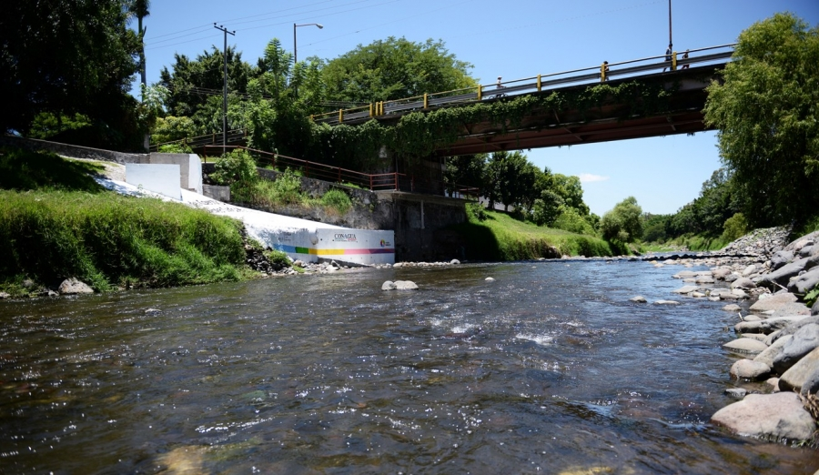 EN LA ORILLA DEL RÍO CUAUTLA